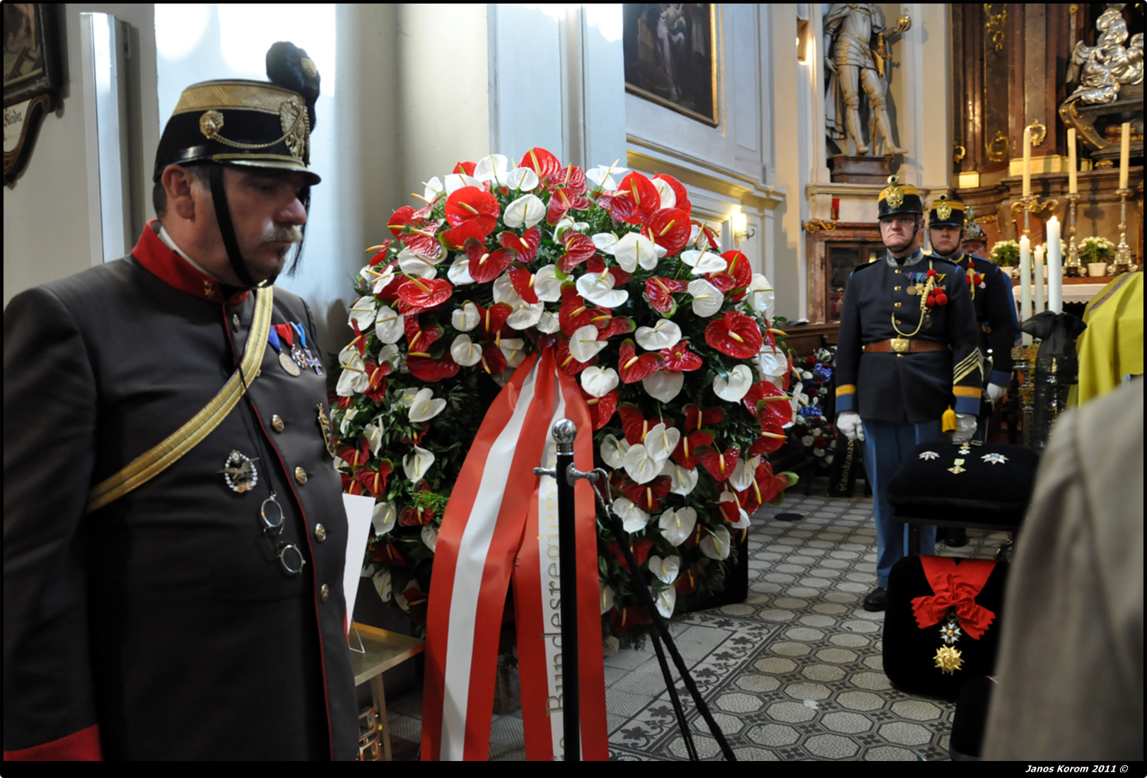 Regina und Otto von Habsburg sind in Wien in der Kapuzinerkirche aufgebahrt